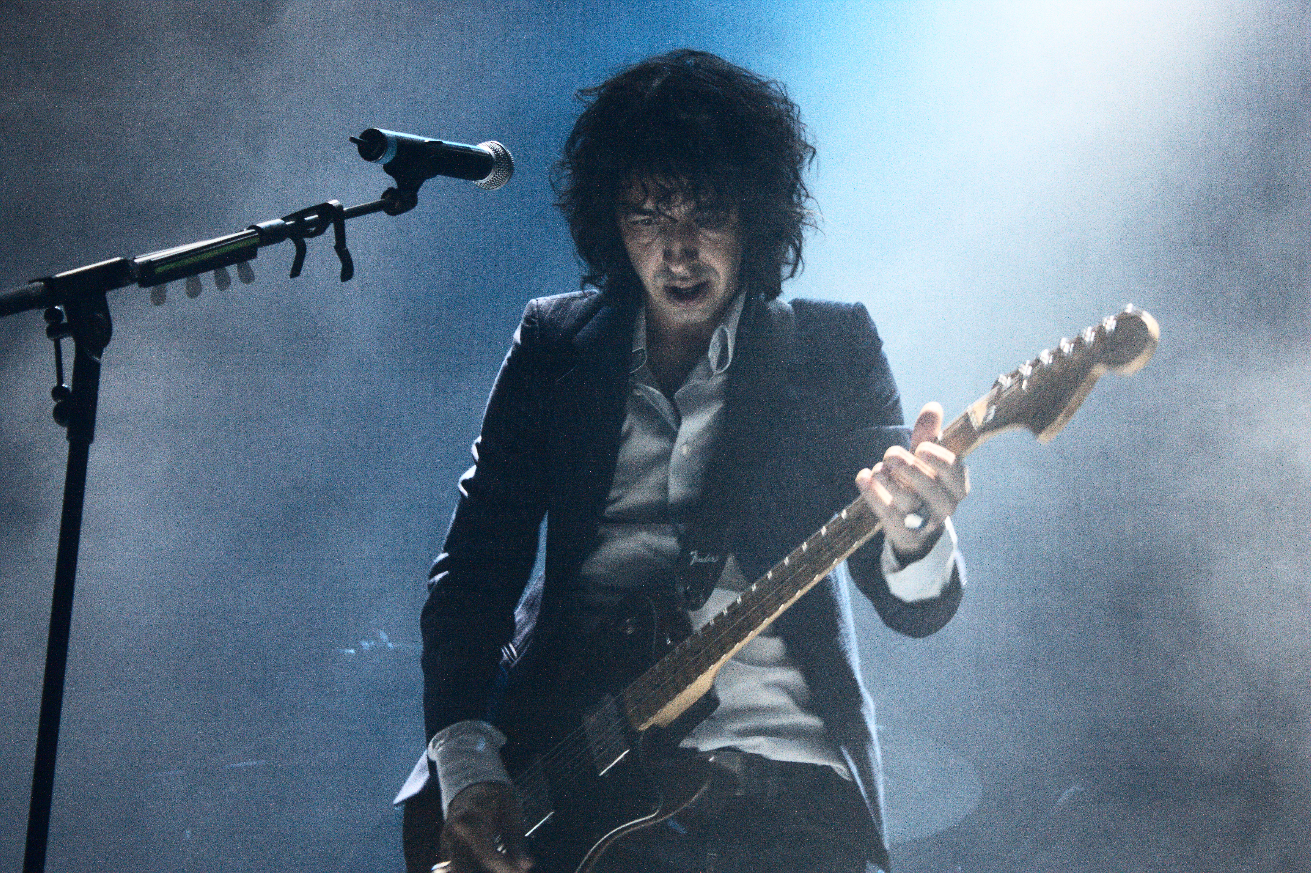 Sidonie en el Contempopranea 2010. Alburquerque (Badajoz) 22/07/2010